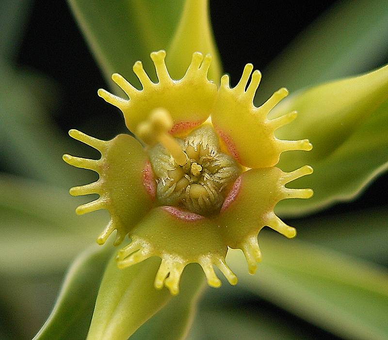 Euphorbia monteiri ssp. brandbergensis